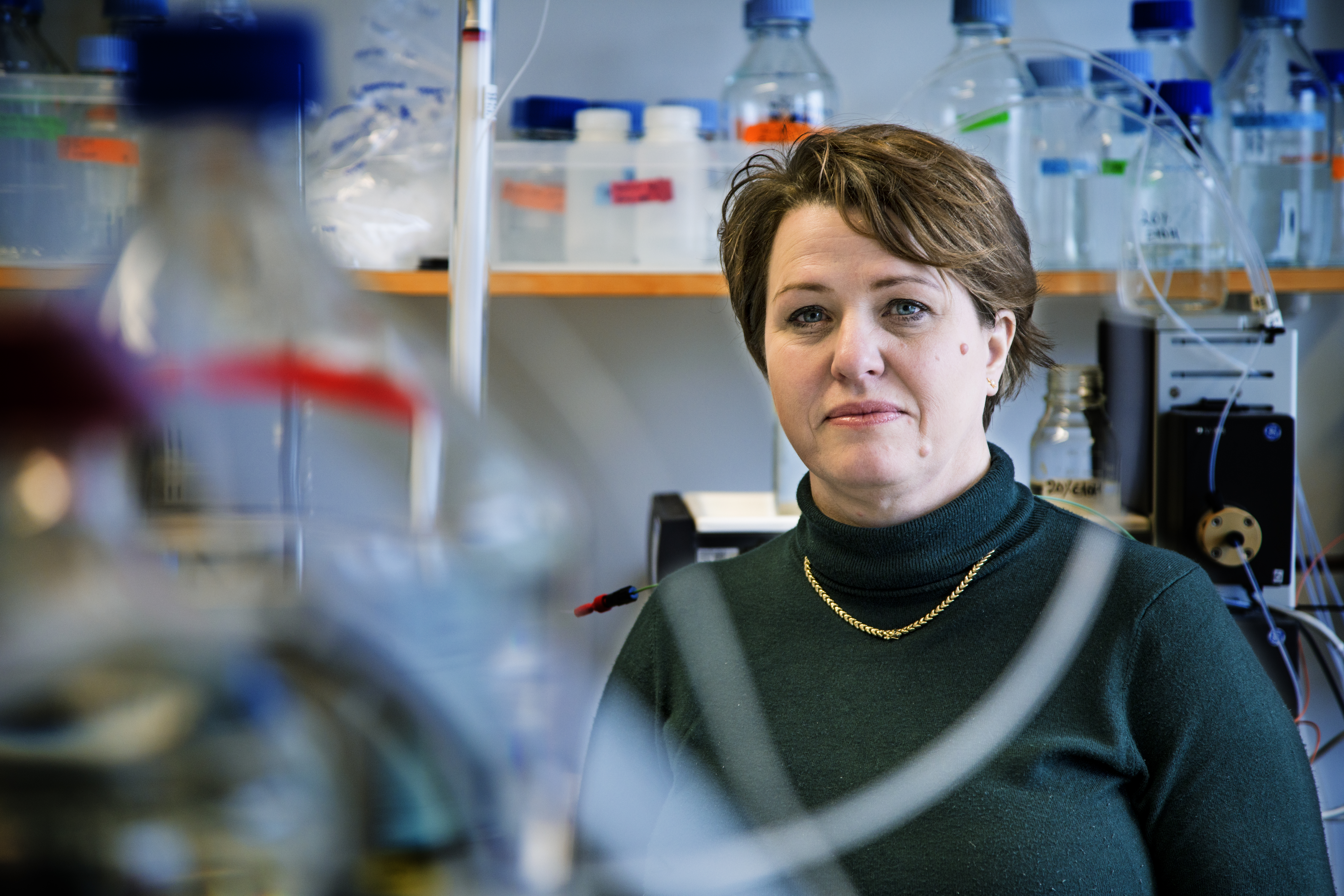 Lisbeth Olsson forskar inom området Industriell Bioteknik, där målsättningen med arbetet är att designa enzymer och mikroorganismer till processer där växtmaterial omvandlas till bränsle, kemikalier och material. Lisbeth leder gruppen Industriell Bioteknik, och är aktiv i styrkeområdena energi och livsvetenskaper. Hon arbetar inom Wallenberg Wood Science Center (samarbete mellan Chalmers och KTH), med målsättningen att skapa morgondagens material från trä. Lisbeth leder det nordiska samarbetsprojektet HGBiofuels, som har för avsikt att skapa hållbar biobränsleproduktion